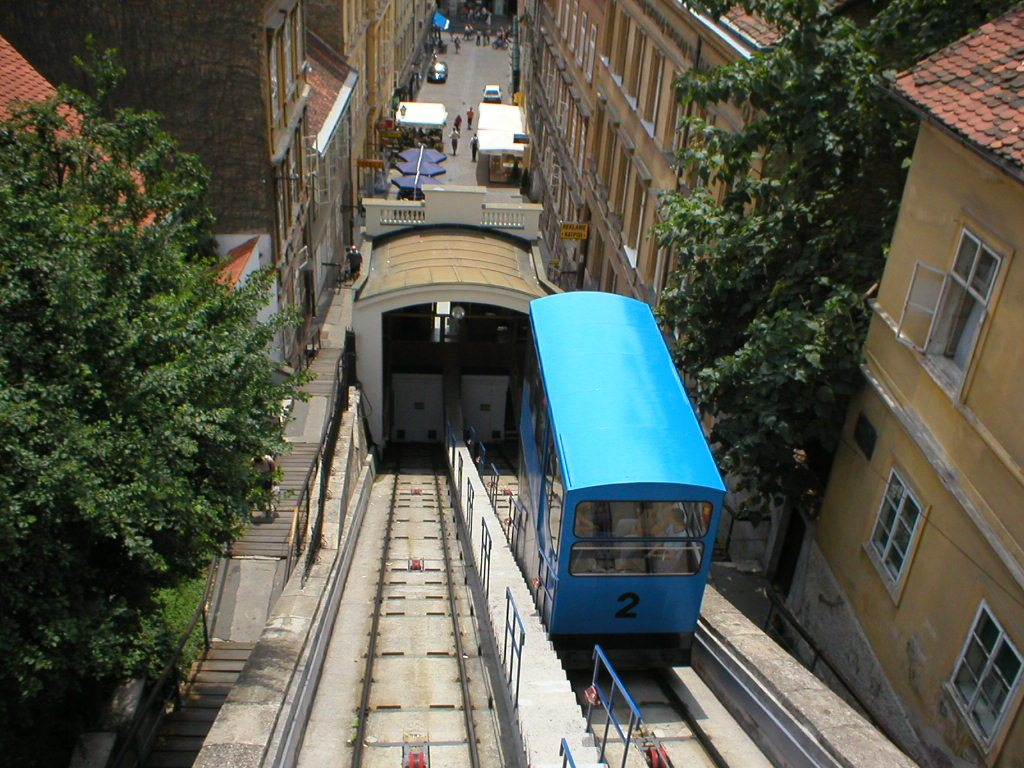 self-made